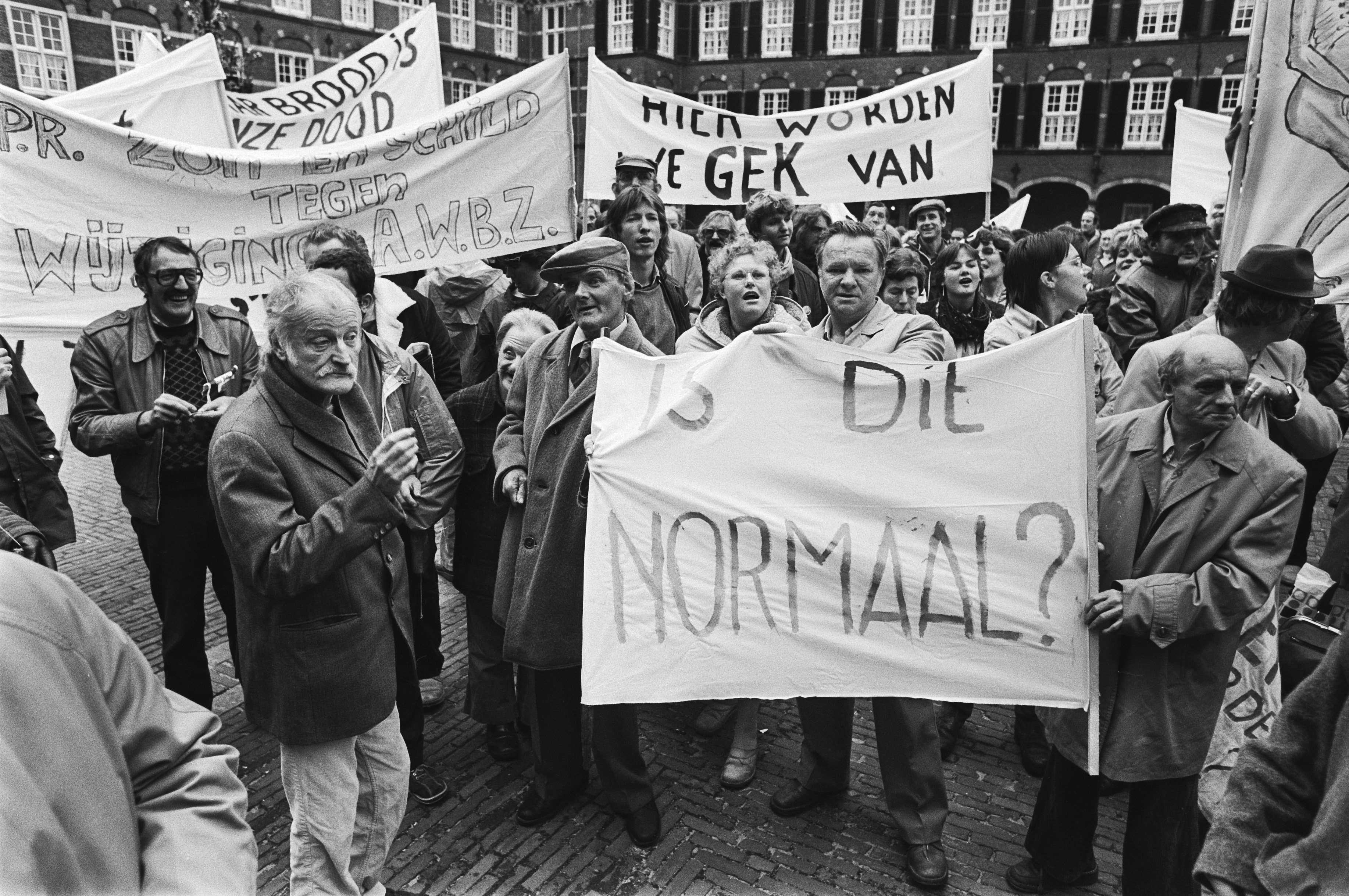 Collectie / Archief : Fotocollectie Anefo Reportage / Serie : Vertegenwoordigers van patiëntenorganisaties demonstreren op het Binnenhof tegen verhoging van de eigen bijdrage bij de Algemene Wet Bijzondere Ziektekosten (AWBZ) Beschrijving : Demonstrerende patiënten met spandoeken Datum : 13 oktober 1982 Locatie : Den Haag, Zuid-Holland Trefwoorden : demonstranten, demonstraties, lastenverhoging, spandoeken Fotograaf : Croes, Rob C. / Anefo Auteursrechthebbende : Nationaal Archief Materiaalsoort : Negatief (zwart/wit) Nummer archiefinventaris : bekijk toegang 2.24.01.05 Bestanddeelnummer : 932-3627